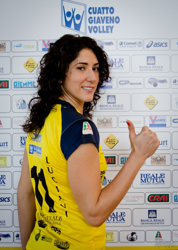 2012-11-07 A1f Giaveno 044